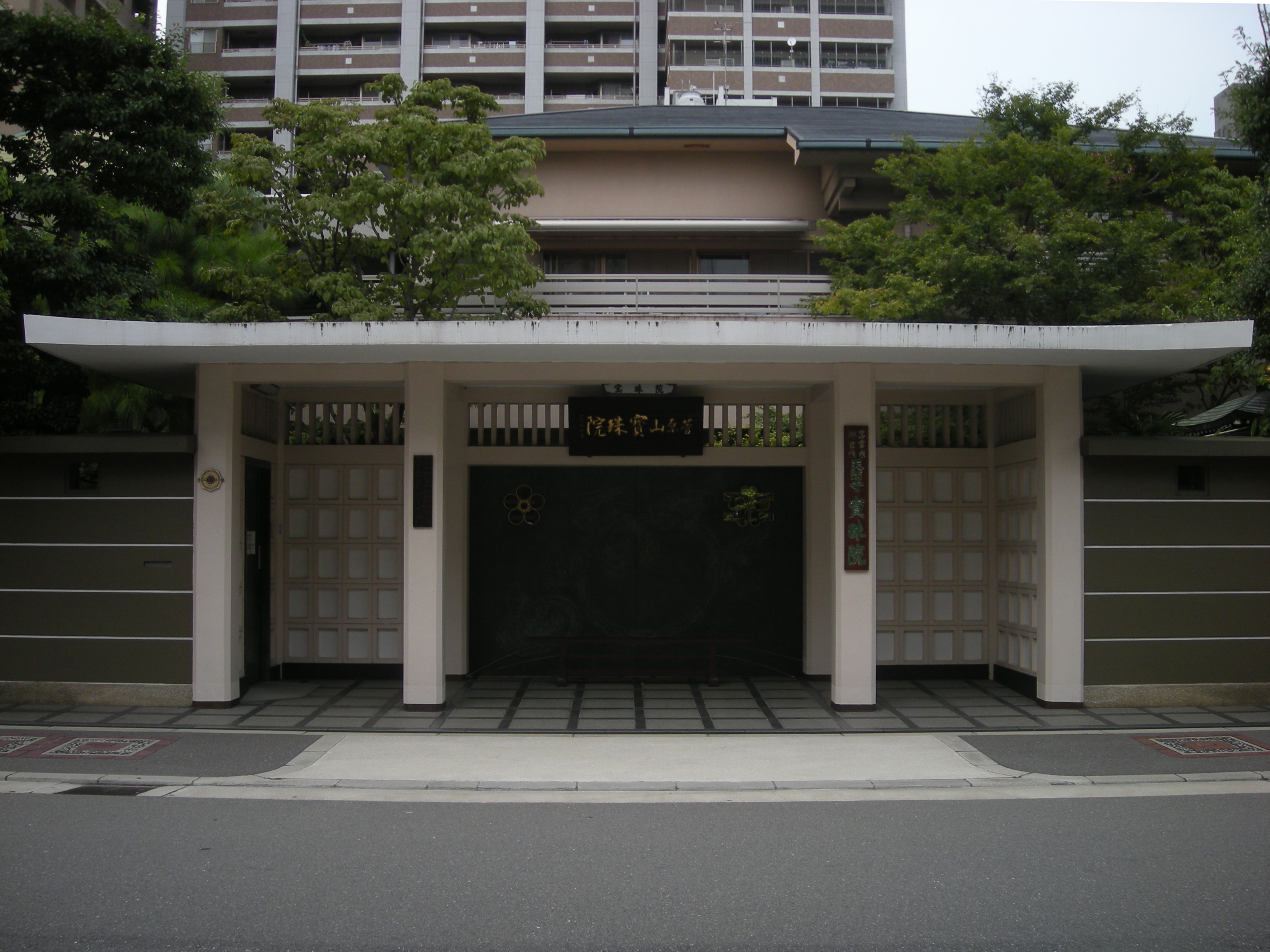 宝珠院 (大阪市) 山門